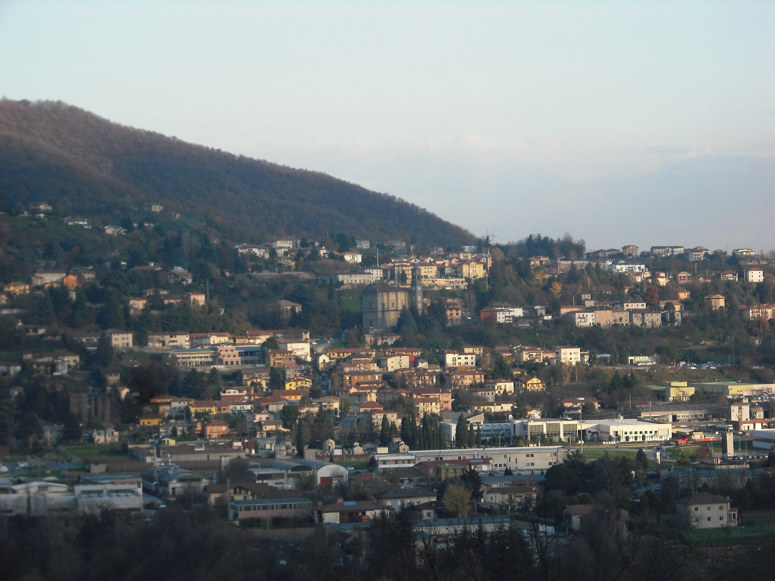 Foto panoramica di Villa d'Adda (Bg)